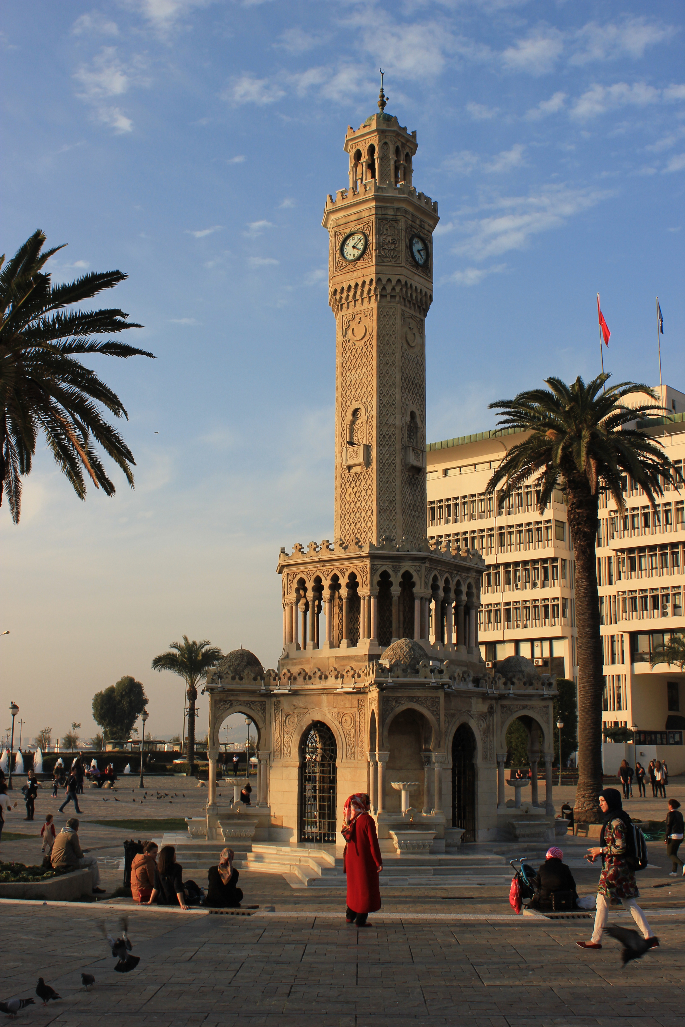 Der Uhrturm von Izmir, Türkei. Hornjoserbsce: Časnikowa wěža w Izmirje, Turkowska.